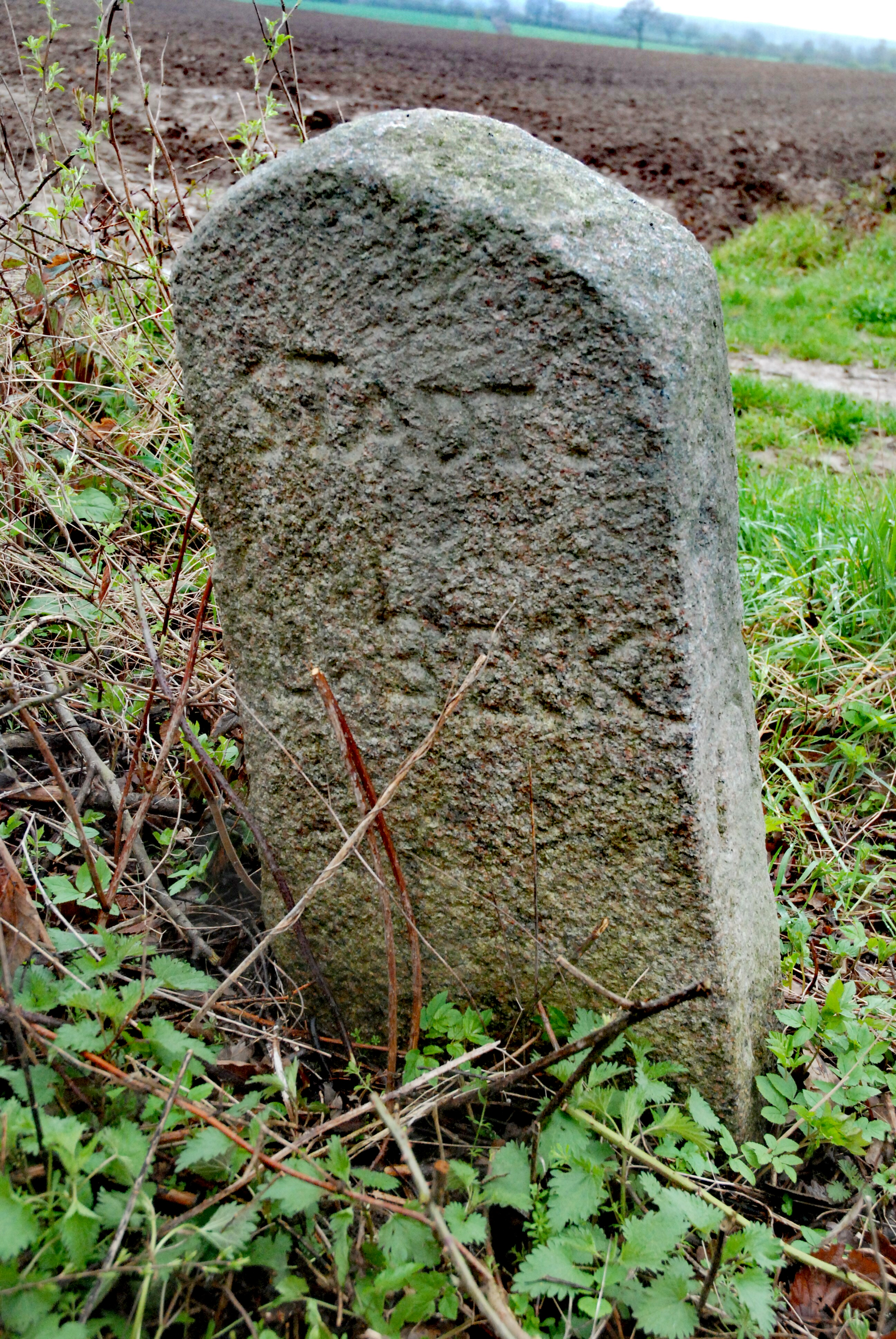 Lübecker Wappenstein an der Verbindungsstraße Düchelsdorf - Sierksrade, Ostseite, Nordansicht